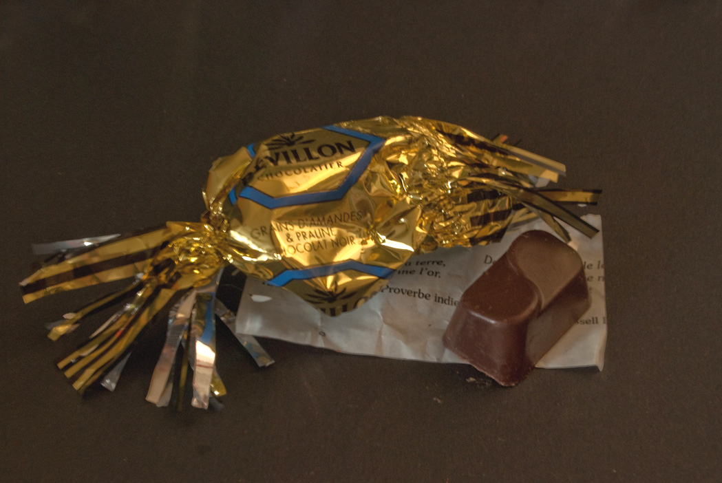 Une friandise traditionnelle pour Noël à Lyon